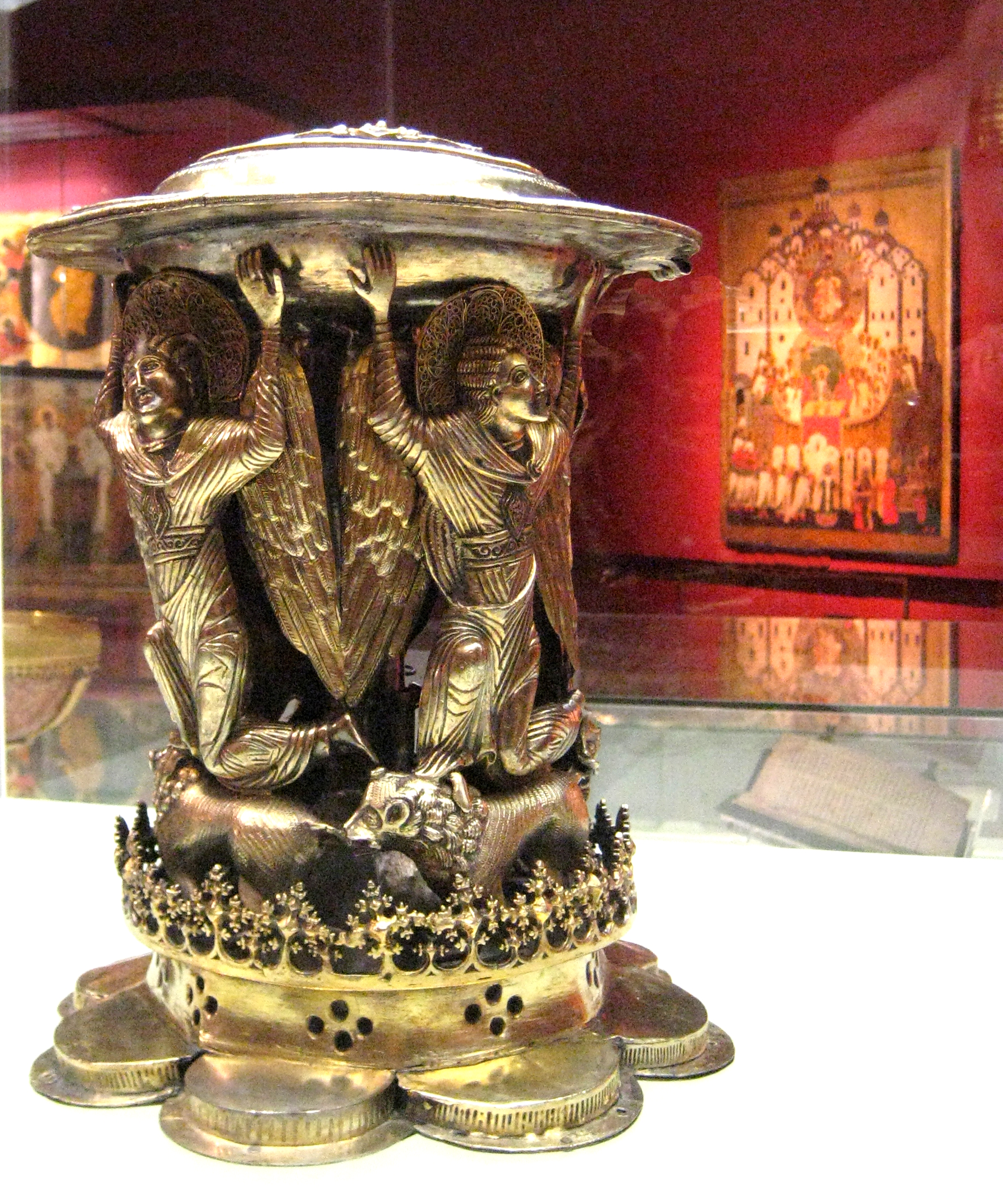 ПАНАГИАР Мастер Иван 1435 год Новгород Серебро, медь; эмаль 30 х 25 x 22,5 Поступил в 1920-е годы На верхней створке: ЛѢT SНОE θ СОТНОE M ДE IНДИKТ ДI МѢЦA СEМТБРЯ ДI ДНЬ НА ВЗДВИЖЕНЬE ЧСТНОГО КРСТА СТВОРEНА БЫС ПОНАГИЯ СИ ПОВEЛѢНЬEМЪ ПРEСВЩНГО АРХИЕEПСКПА ВEЛИКОГО НОВАГРАДА ВЛЦИ EОУθИМИЯ ПРИ ВЕЛИКОМЪ КНЗѢ ВАСИЛЬѢ ВАСИЛЬЕВИЧ ВСЕЯ РОУСИ ПРИ КНЗѢ ЮРЬѢ ЛОУГВЕНЬЕВИЧ ПРИ ПОСАДНИКѢ ВЕЛИКОГ НОВАГОГОРОД БОРИСѢ ЮРЬEВИЧ ПРИ ТЫСЯЦКОМ ДМИТРEѢ ВАСИЛЬЕВИЧ А МАСТЕРЪ ИВАНЪ АРИПЪ Происходит из Софийского собора в Великом Новгороде Реставрирован в 1977 году в ГосНИИР НГОМЗ инв. КП 1108 ДРМ 268